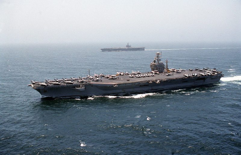 美國海軍艾森豪號航空母艦 隸屬zh:美國海軍的艾森豪號核子動力航空母艦(USS Dwight D. Eisenhower CVN-69)，在zh:印度洋上與正趕往zh:阿拉伯海參加zh:南方守望行動(Operation Southern Watch)的姊妹艦華盛頓號航空母艦並排航行。照片攝於zh:2000年zh:7月22日。 本照片下載自美國海軍官方新聞網站，由美國海軍開放照片版權至公共領域。